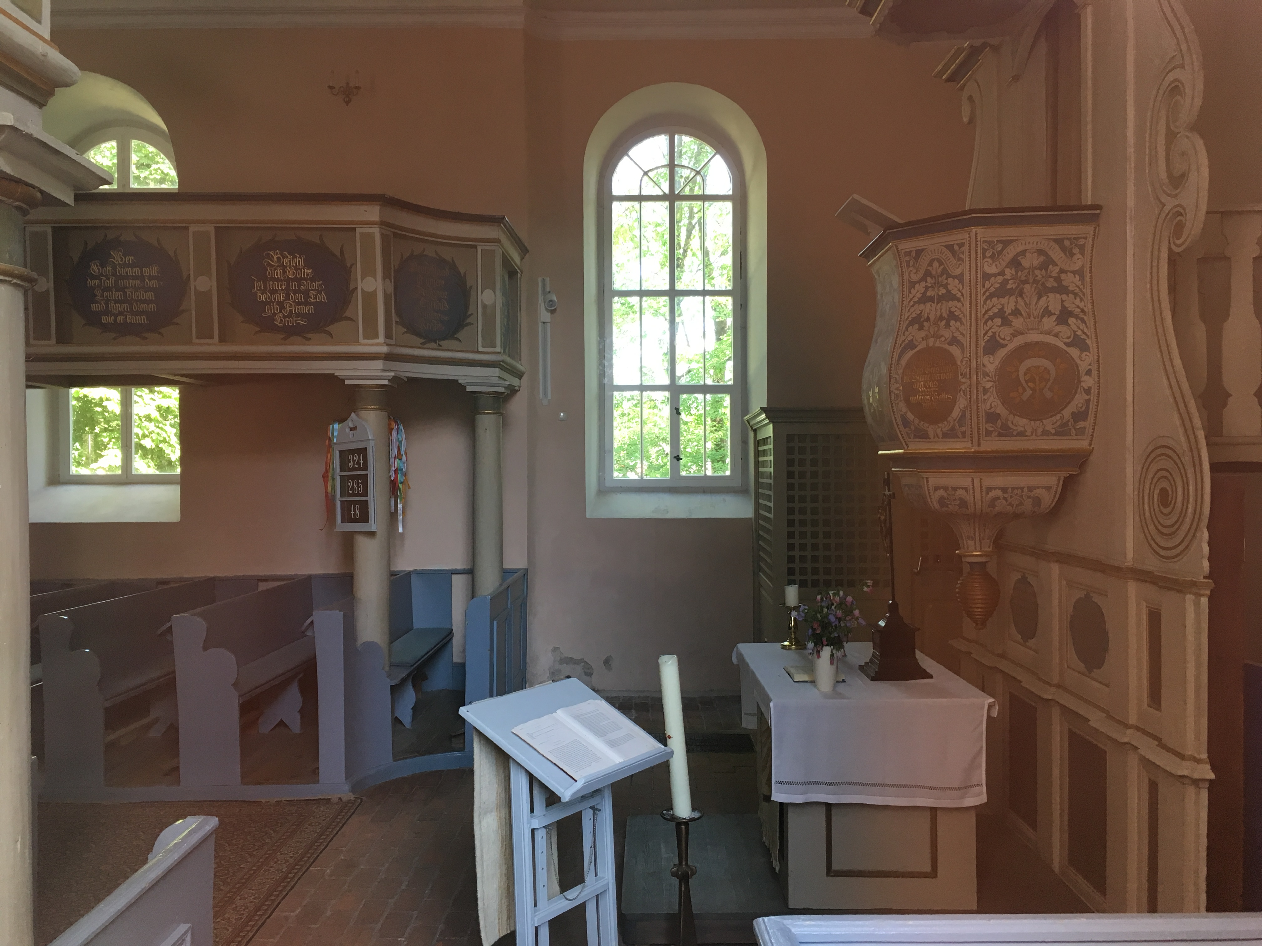 Die Dorfkirche in Mahlow ist eine Saalkirche aus der zweiten Hälfte des 13. Jahrhunderts. Sie wurde in den Jahre 1755 und 1758 erheblich umgestaltet. Im Innern stehen unter anderem ein Kanzelaltar mit dem Monogramm FR von Friedrich II..